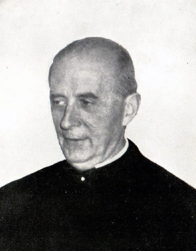 ritratto